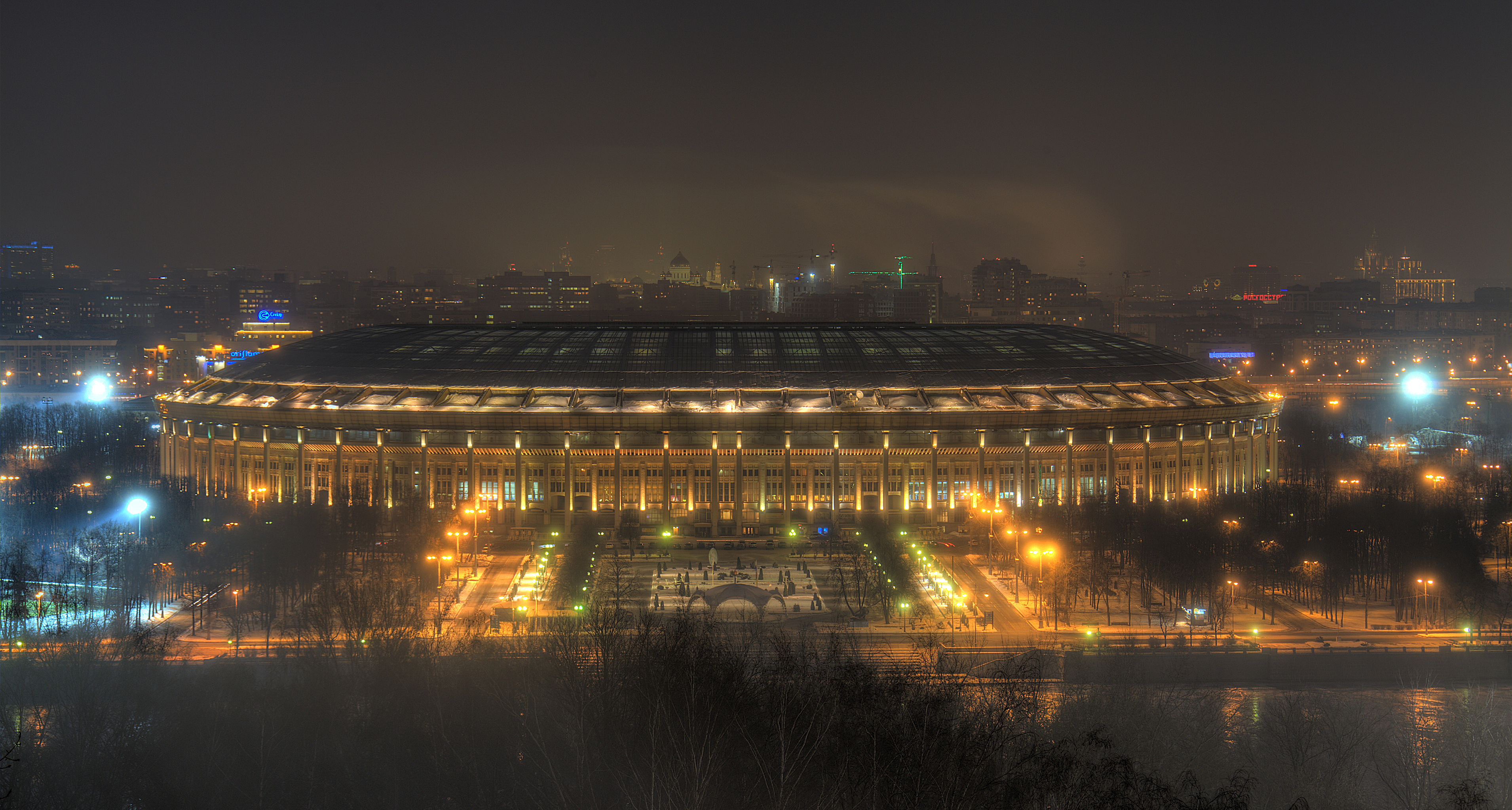 Олимпийский Комплекс Лужники. Большая спортивная арена.